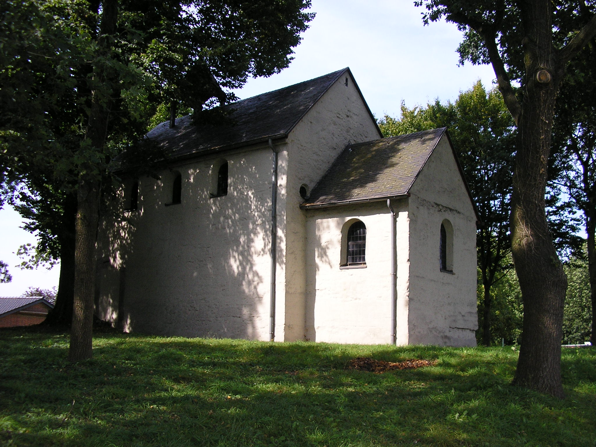 Rommerskirchen-Ramrath, Lambertuskapelle 9./10. Jh.